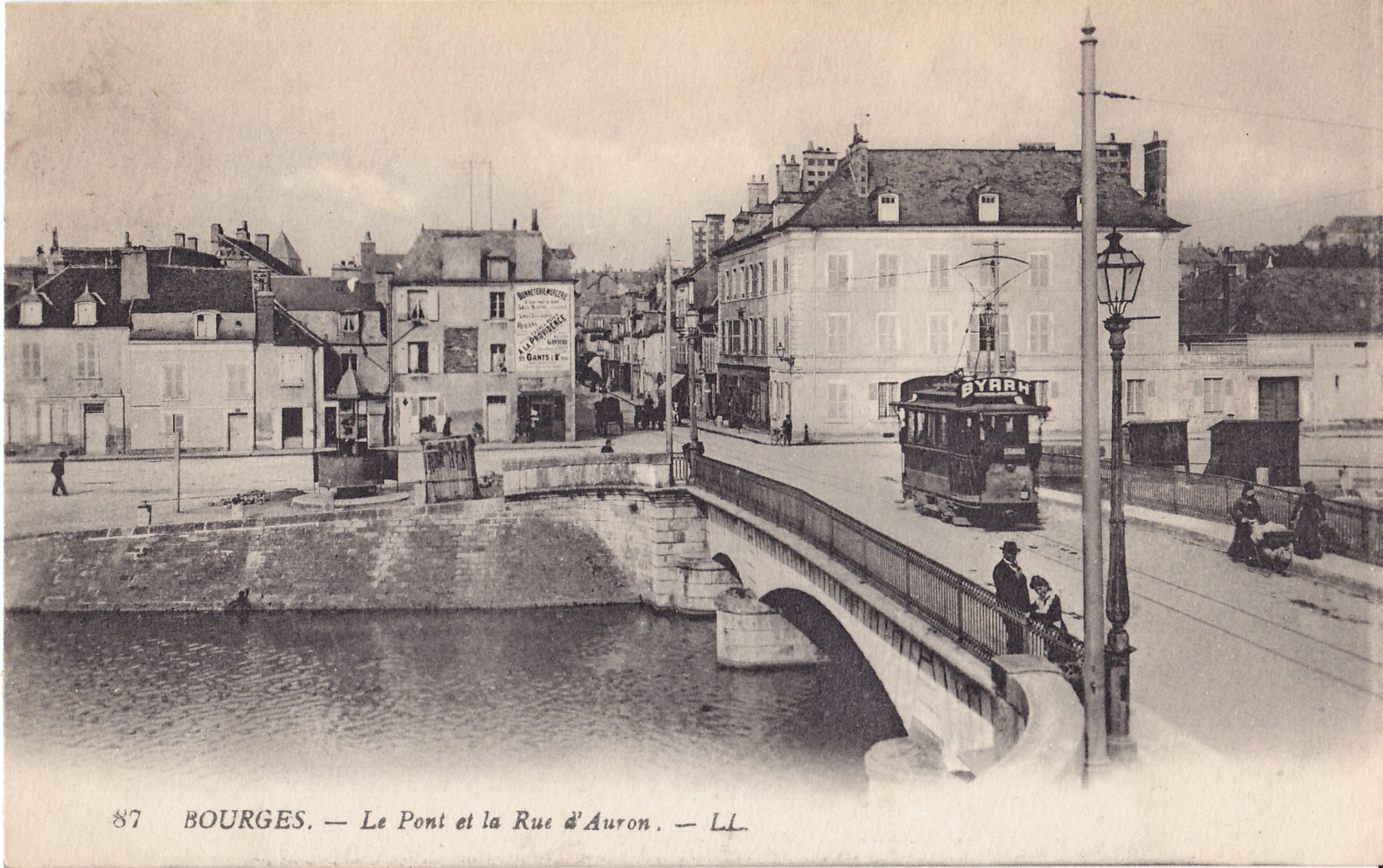 Carte postale ancienne éditée par LL, n°87 : BOURGES - Le Pont et la Rue d'Auron